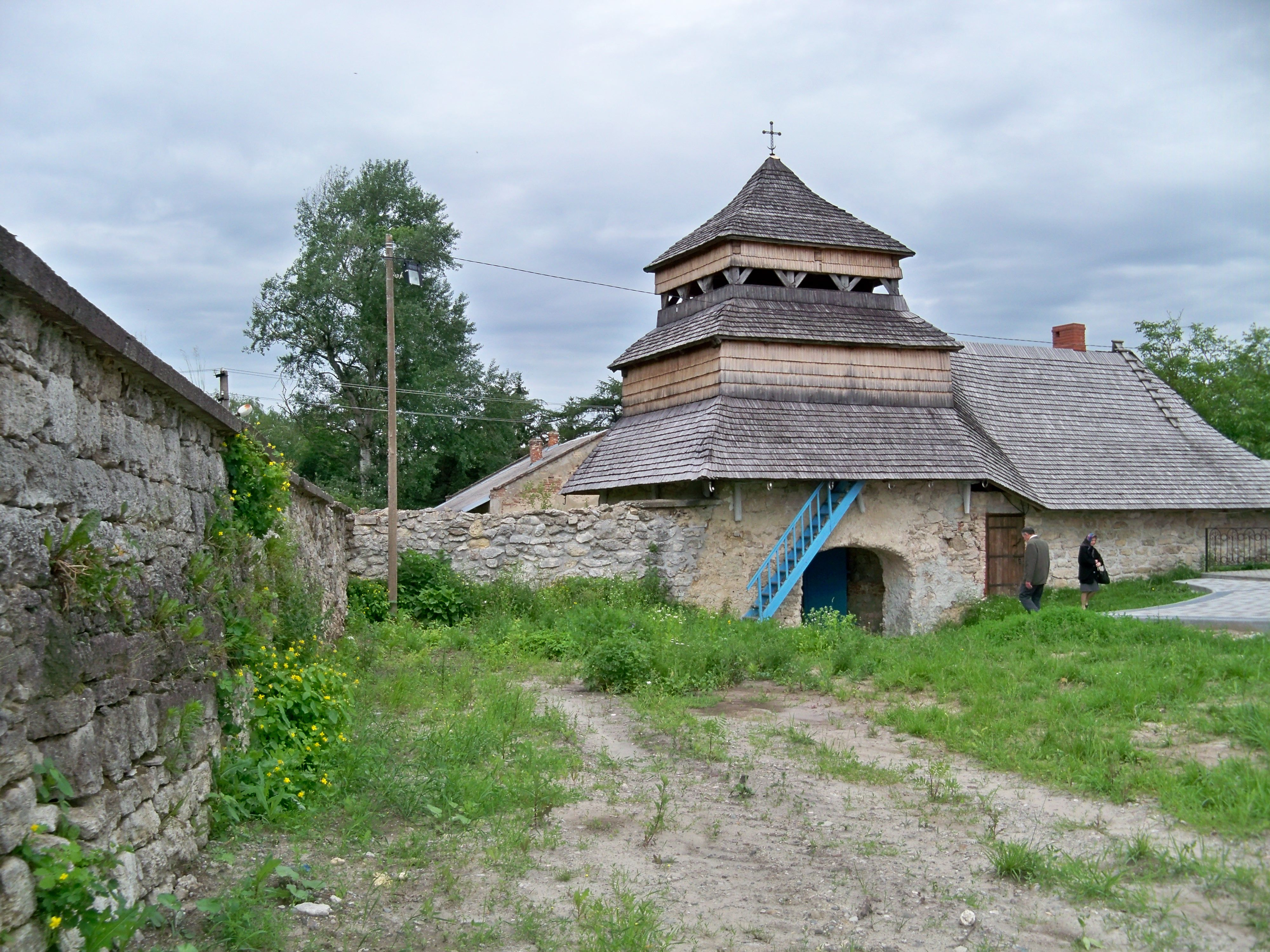 Надбрамна дзвіниця з мурами (мур.), с.Піски